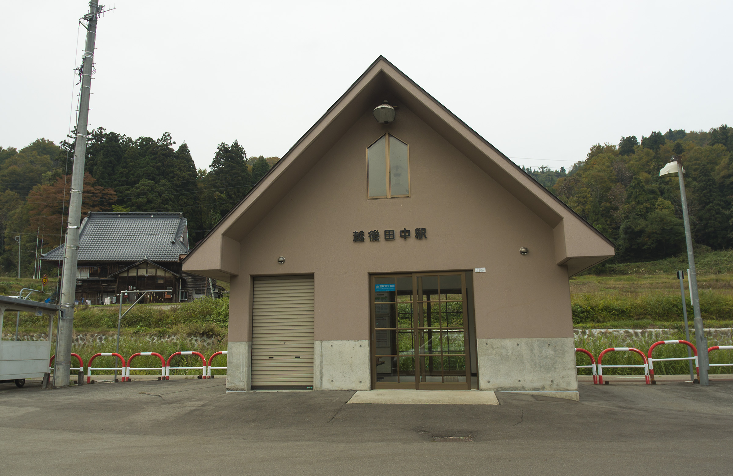 東日本旅客鉄道株式会社飯山線越後田中駅